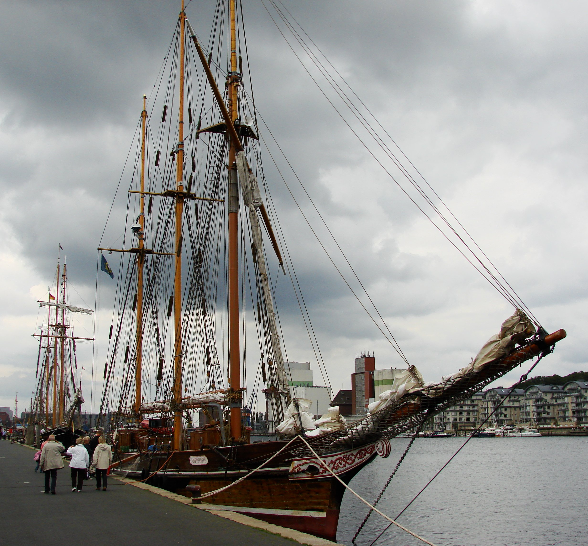 Die Dreimastschoner Amphitrite (rechts, im Vordergrund) und Albatros (links, im Hintergrund) am Quai in Flensburg